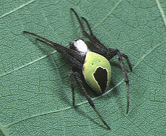 female Neoscona mellotteei from Okinawa.